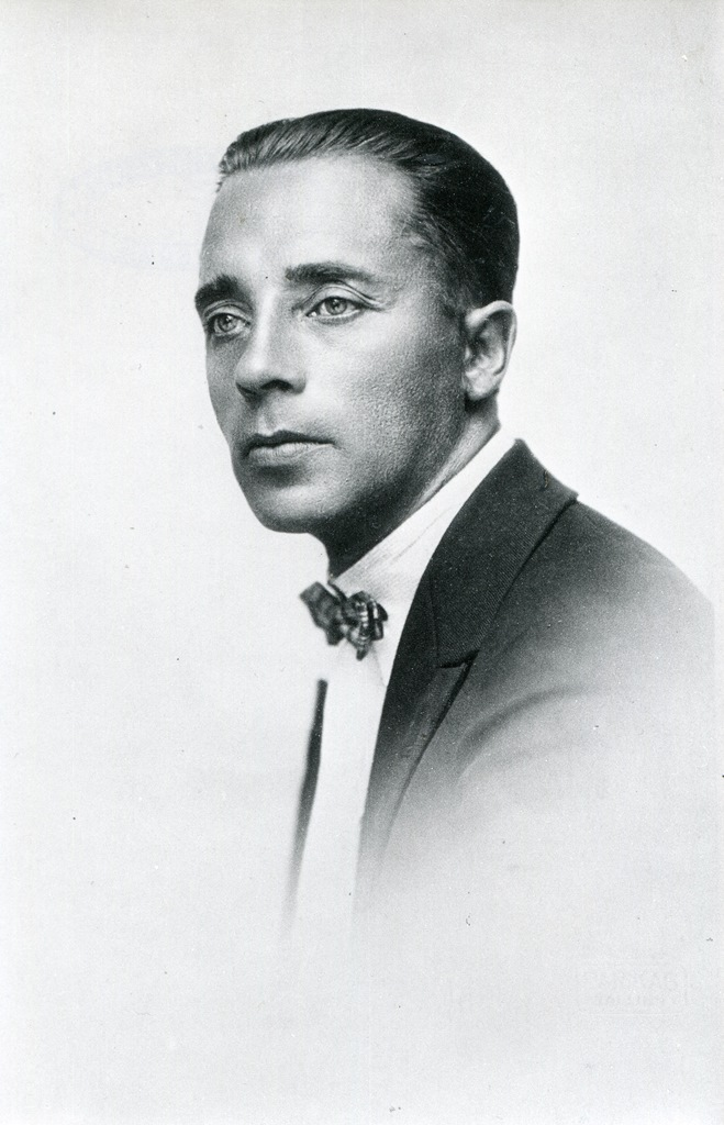 Voldemar Kangro-Pool